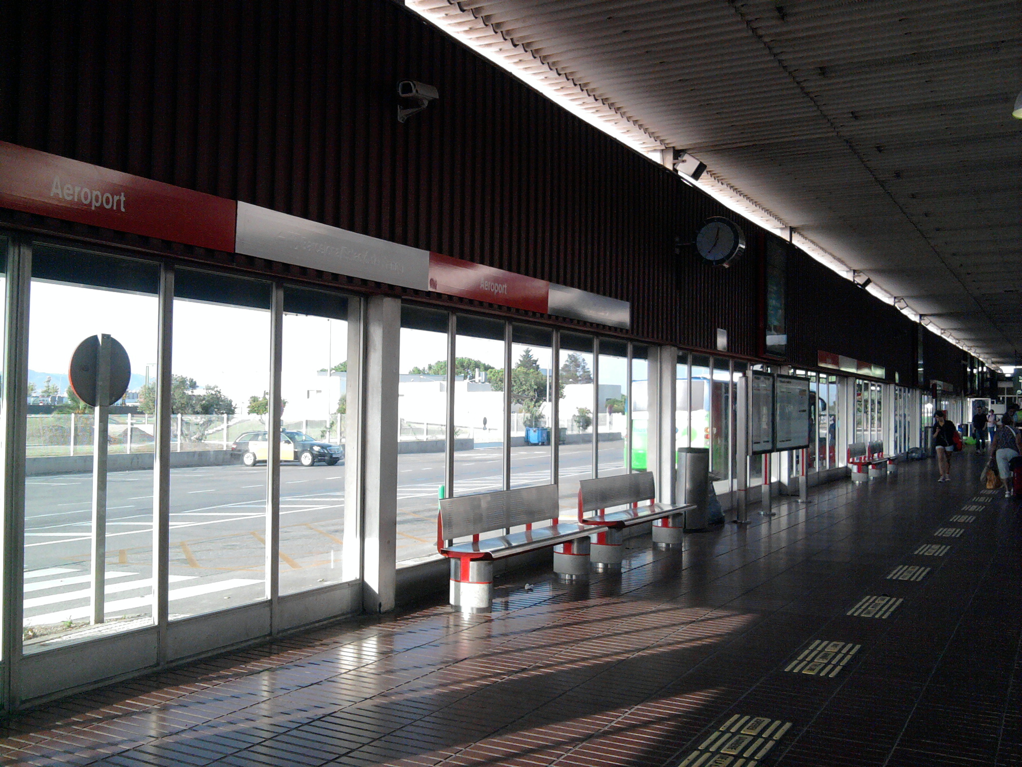 Foto capturada per la meva càmara a l'estació de l'Aeroport (el Prat).